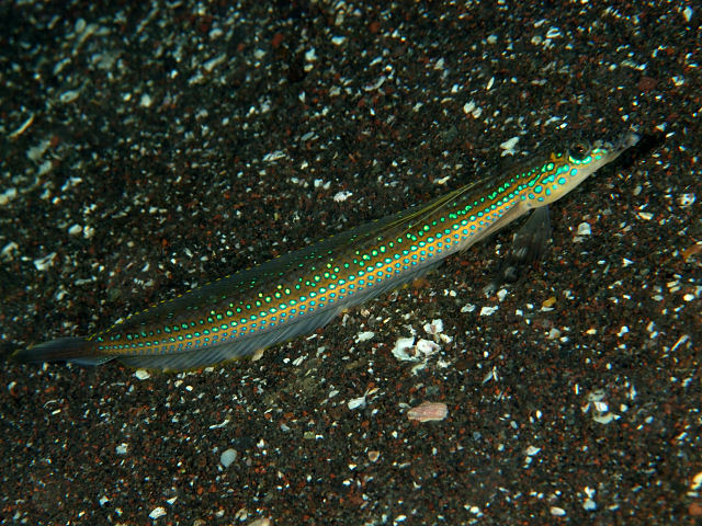 ベラギンポ Trichonotus setigerus